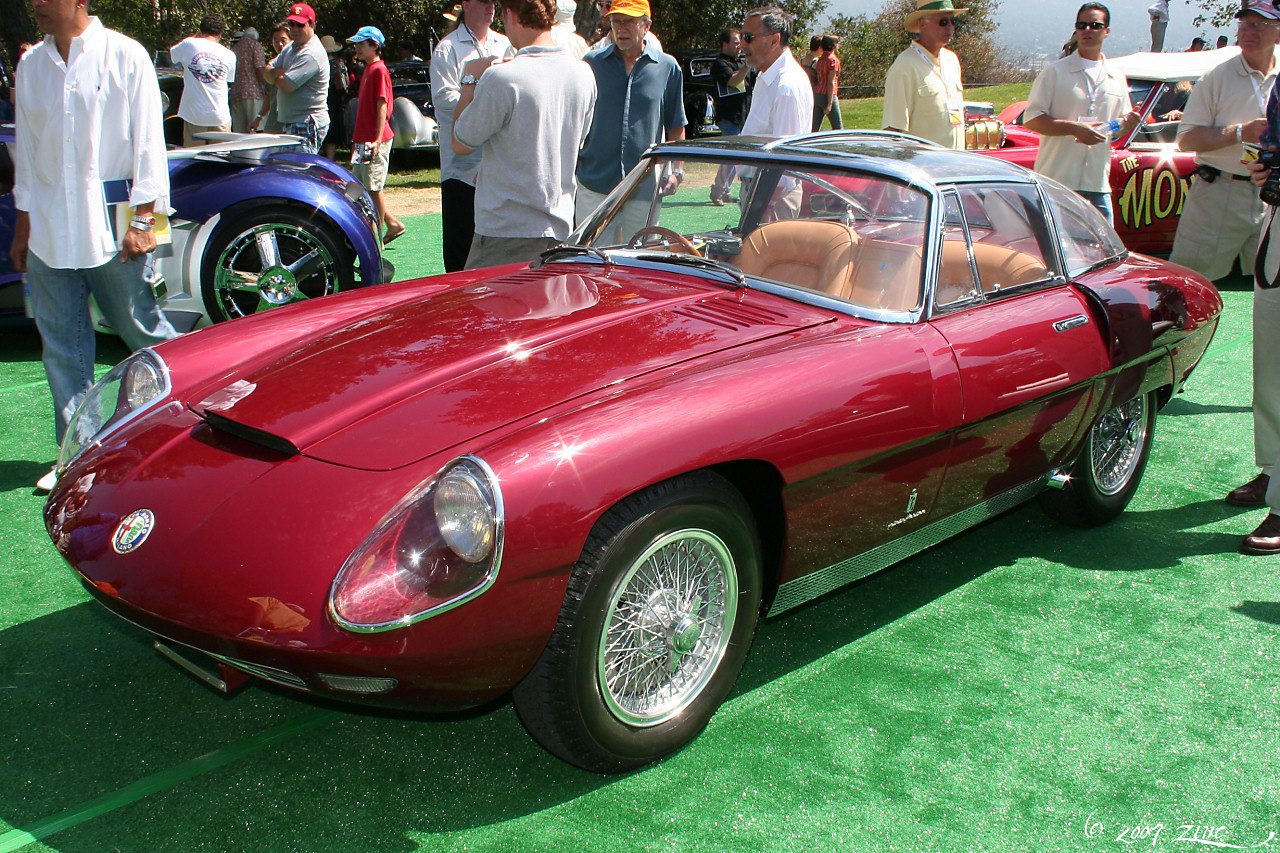 Pasadena Art Center Car Classic, July 7, 2007